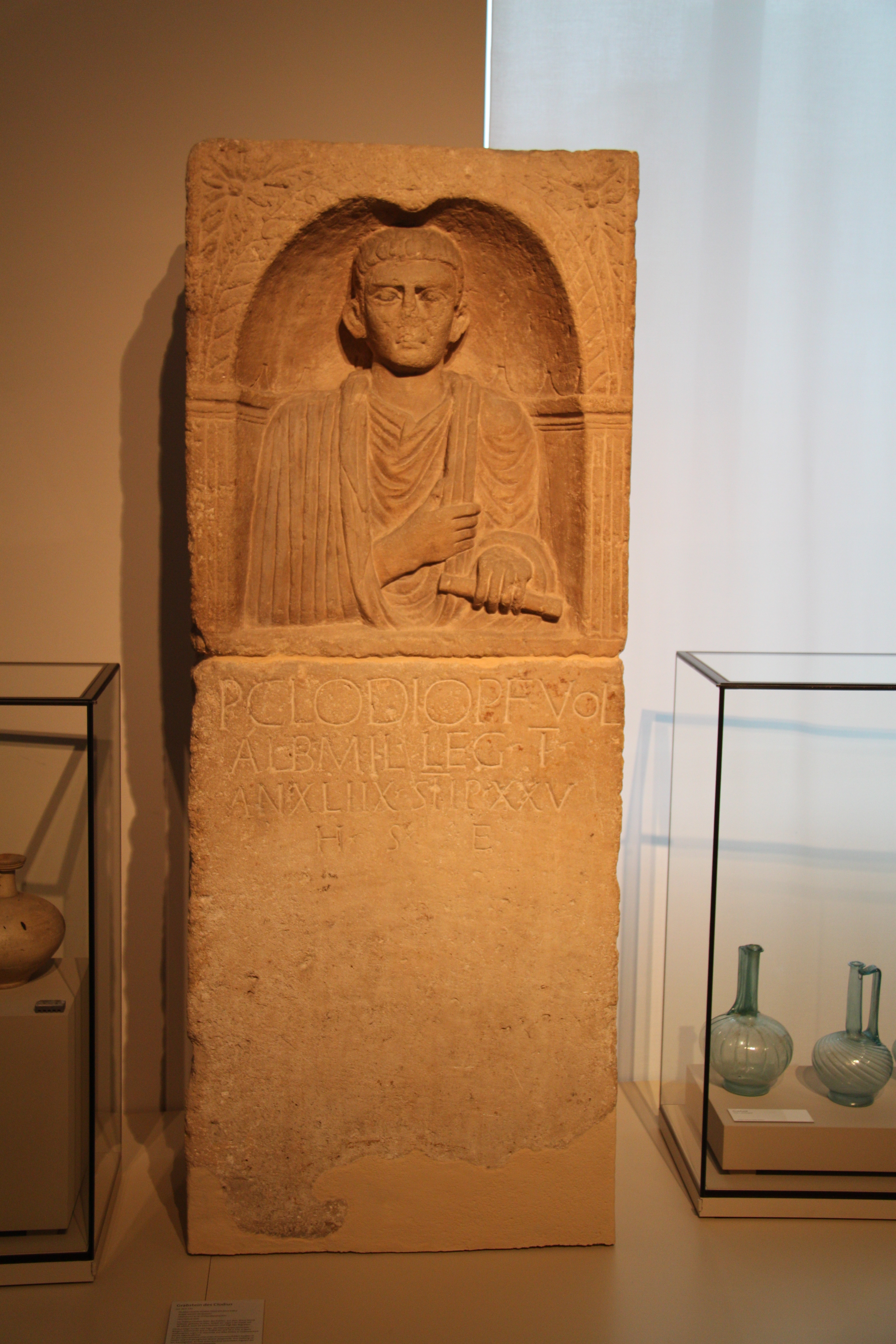 Ausstellungsstück im Landesmuseum Bonn. CIL XIII 8056:P(ublio) Clodio P(ubli) f(ilio) Vol(tinia) / Alb(a) mil(iti) leg(ionis) I / an(norum) XLIIX stip(endiorum) XXV / h(ic) s(itus) e(st) Rheinisches Landesmuseum Bonn Native nameLVR-LandesMuseum Bonn. Rheinisches Landesmuseum für Archäologie, Kunst- und KulturgeschichteParent institutionLandschaftsverband RheinlandLocationBonnCoordinates50° 43′ 54.84″ N, 7° 05′ 33″ E Established1820 (as "Antiquitäten-Museum")Web page control : Q318614 VIAF: 133114074 ISNI: 0000 0001 0942 0528 LCCN: n80098179 GND: 37793-4 SUDOC: 027410803 WorldCat institution QS:P195,Q318614